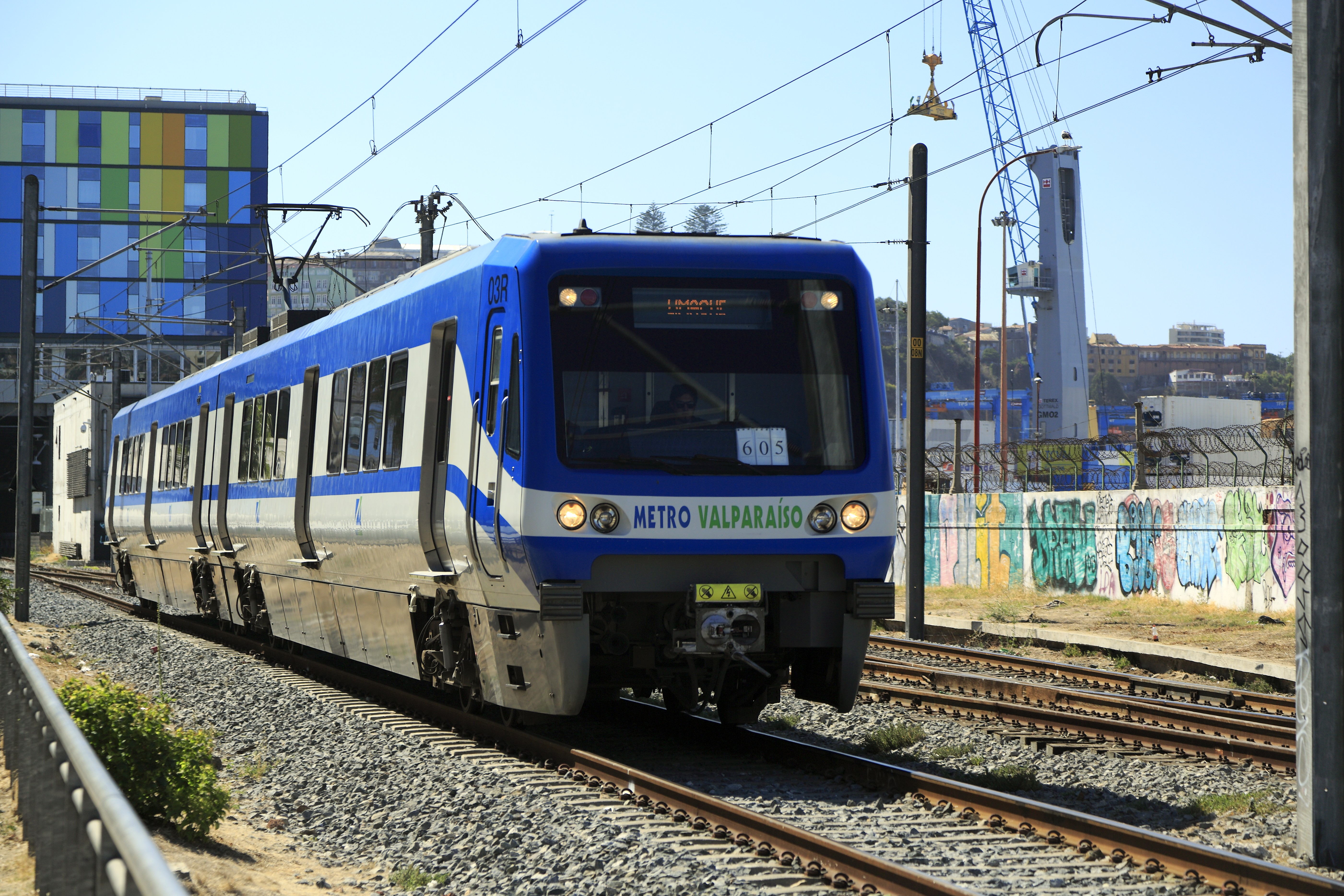 Zugfahrt Richtung Limache beim Verlassen des Bahnhofs Puerto. Sonntags verkehren die Züge nur als Einzeleinheiten, das Aufkommen rechtfertigt keine Doppeltraktion.Die auf der Seite Limache laufenden Wagen mit dem Buchstaben R (remolque) hinter der Wagennummer sind Steuerwagen, die Achsfolge der Einheiten ist Bo’Bo’+2’2’.